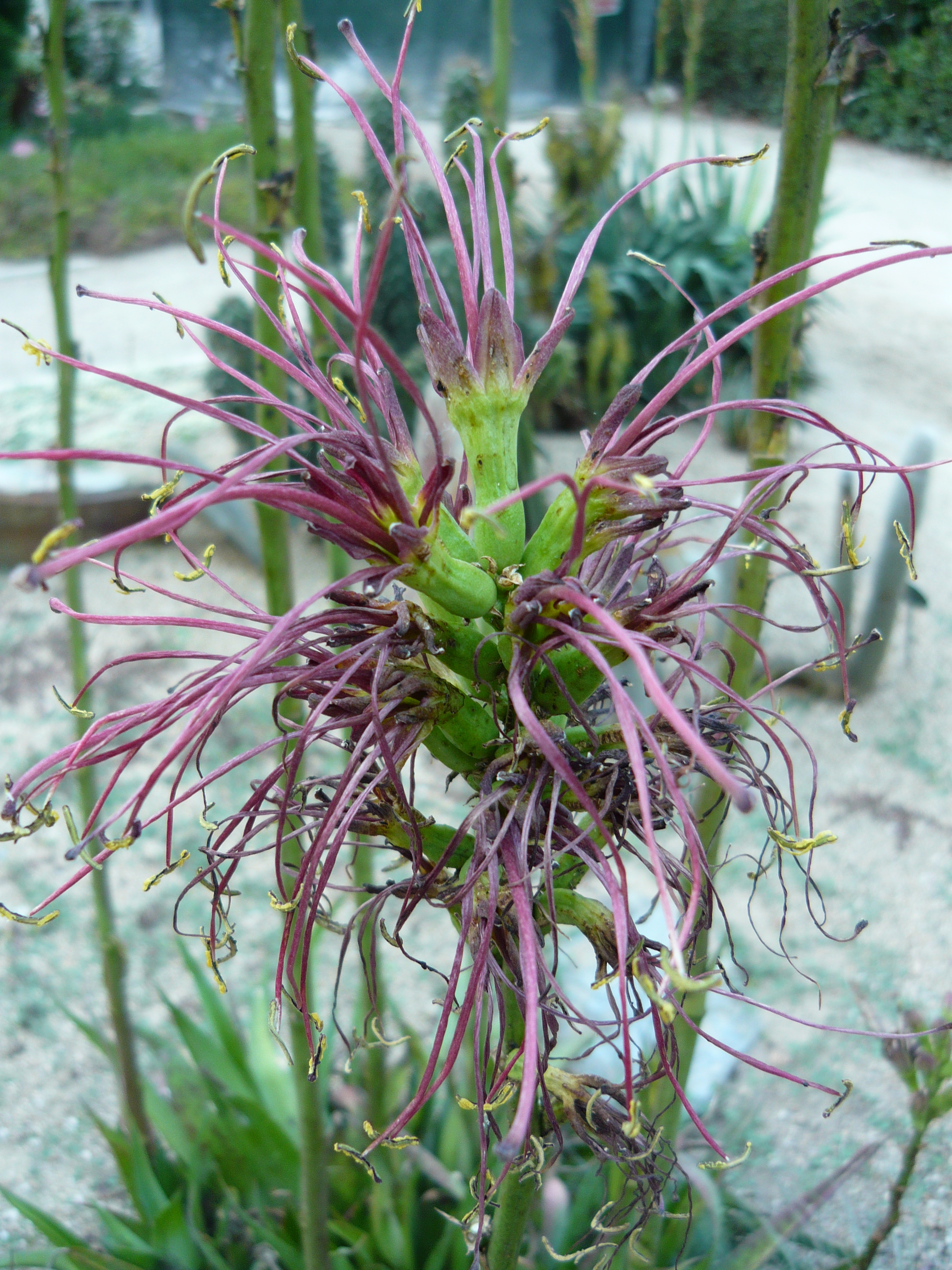 Agave pubescens. Real Jardín Botánico de Madrid.